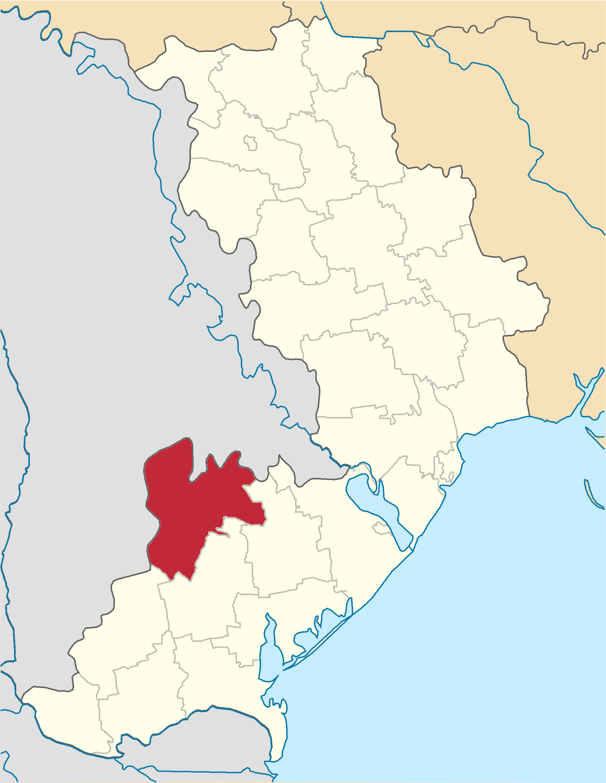 Tarutynskyi-Raion map